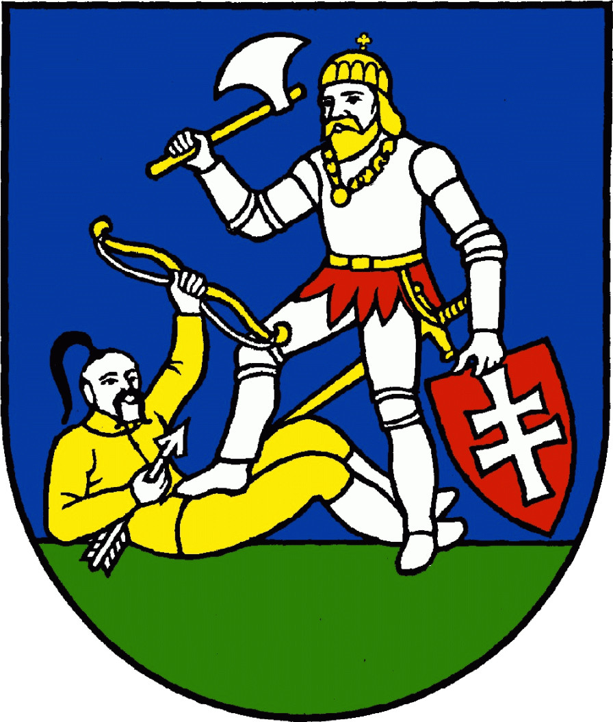 Herb Kraju Nitrzańskiego